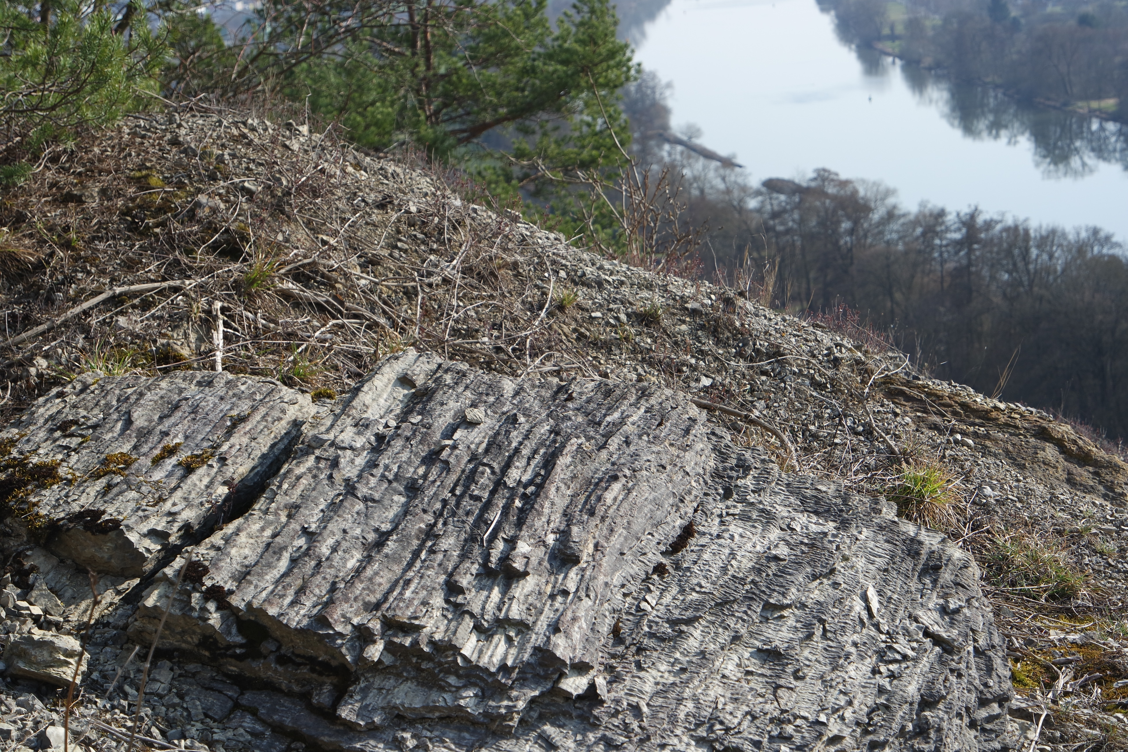 Kalbenstein nördl. Karlstadt - Bild vom Aufstieg durch das Bergsturzgelände